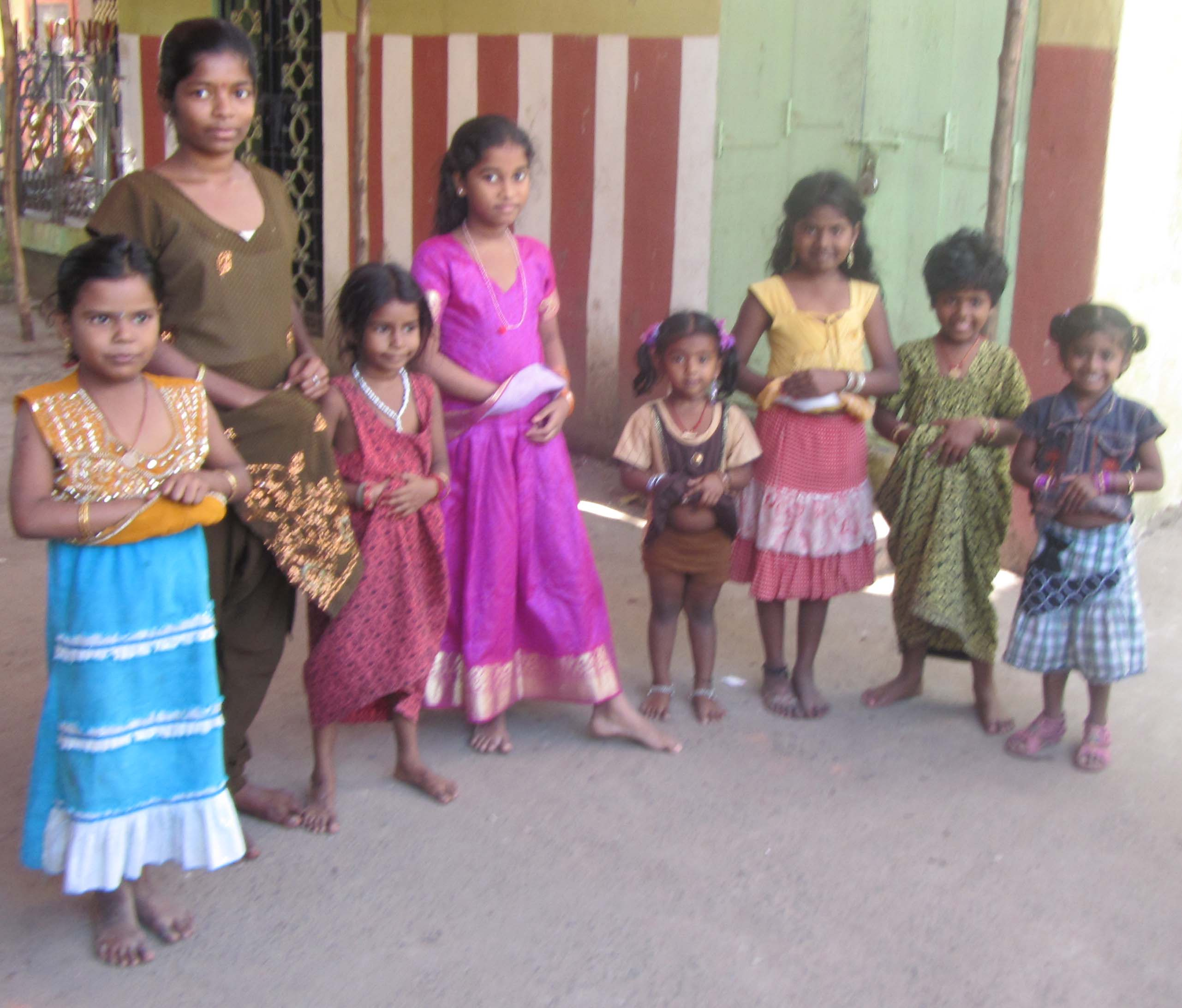 ஊதாமணி விளையாட்டில் விளையாடும் சிறுமியர் மறைத்து வைத்துள்ள ஊதாமணி மாலை தன்னிடம் உள்ளது போல நடித்தல் - own shot